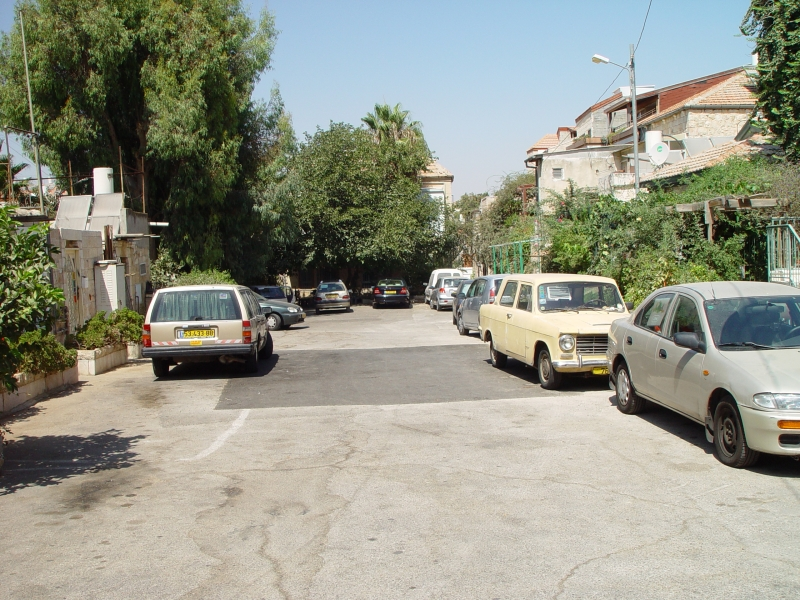 חצר מרכזית שכונת שערי צדק ירושלים